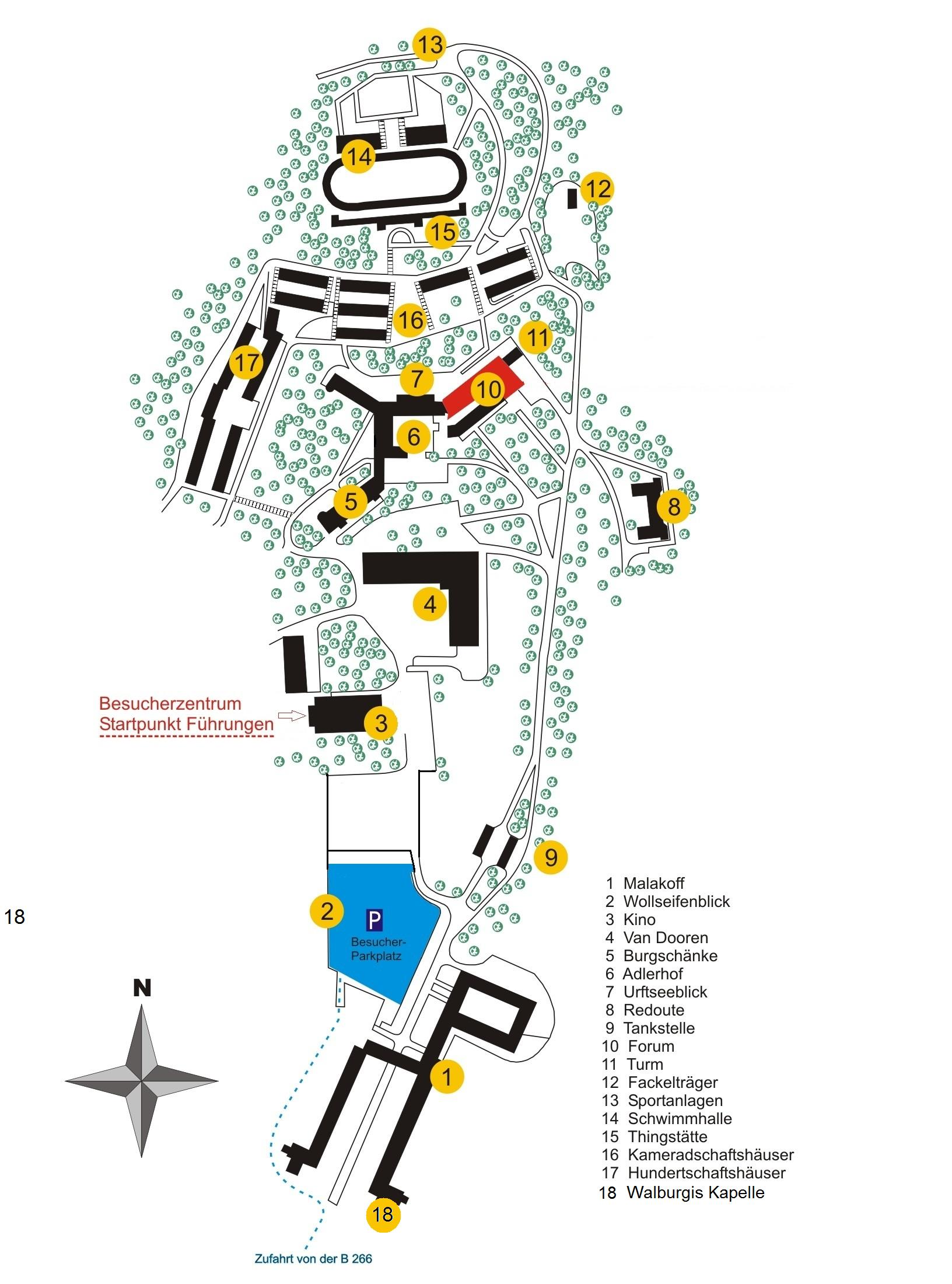 Deutschland, Schleiden, Ordensburg Vogelsang, Geländeplan: NS-Architektur, Bauten des belgisches Militärs und der Vogelsang ip, gemeinnützige GmbH